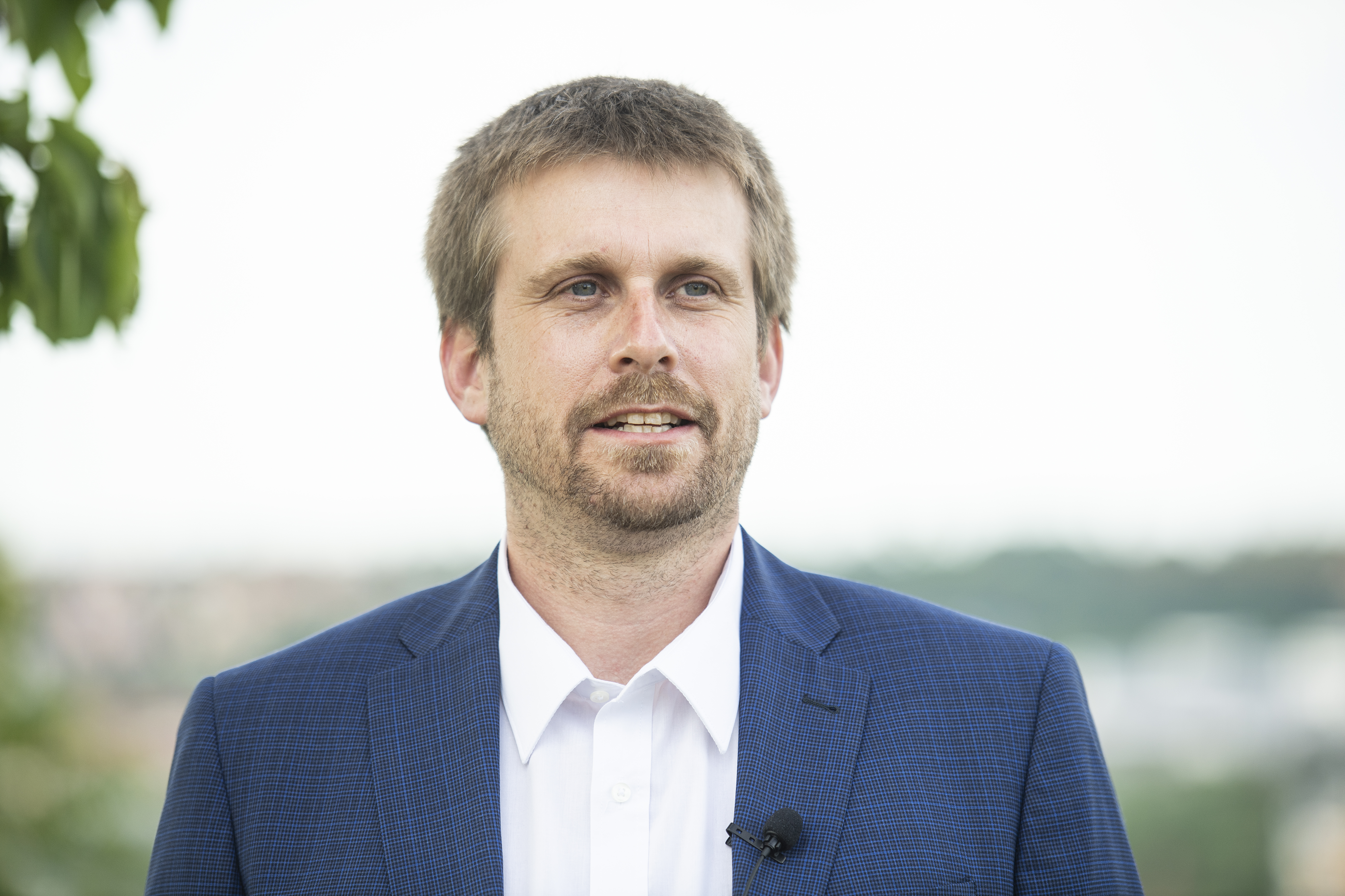 Portrét historika a politika Davida Pavláta